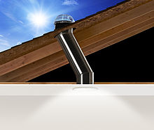 Solatube créateur du conduit de lumière.